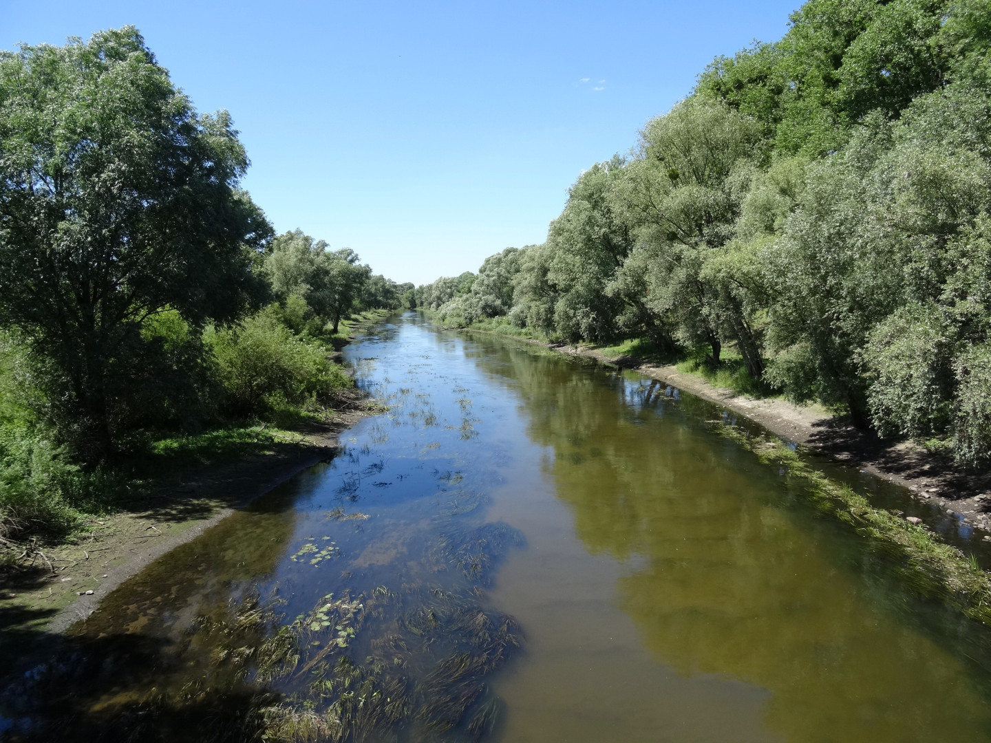 Wda w Świeciu